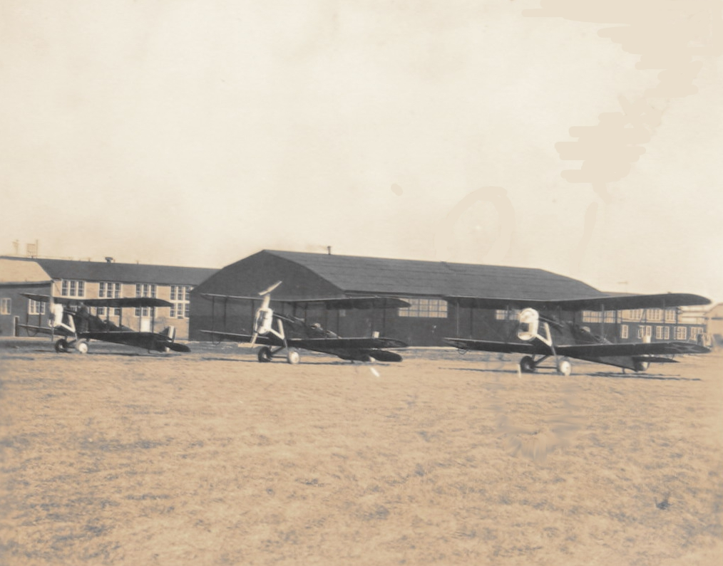 Tre de HAvilland DH.4B della US Army nel 1927